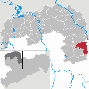 Liebschützberg in Saxony - Landkreis Nordsachsen